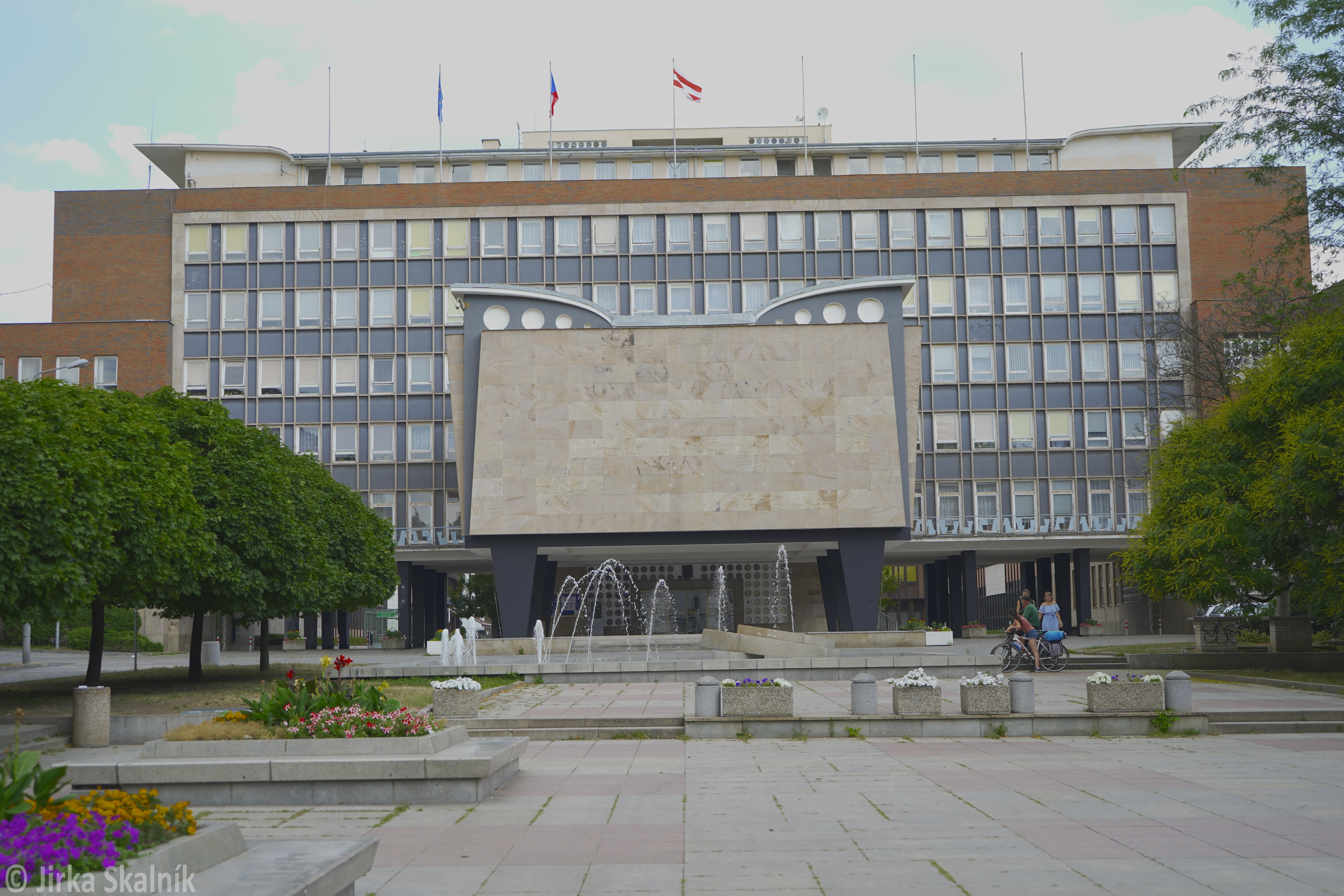 Magistrát města Ústí nad Labem